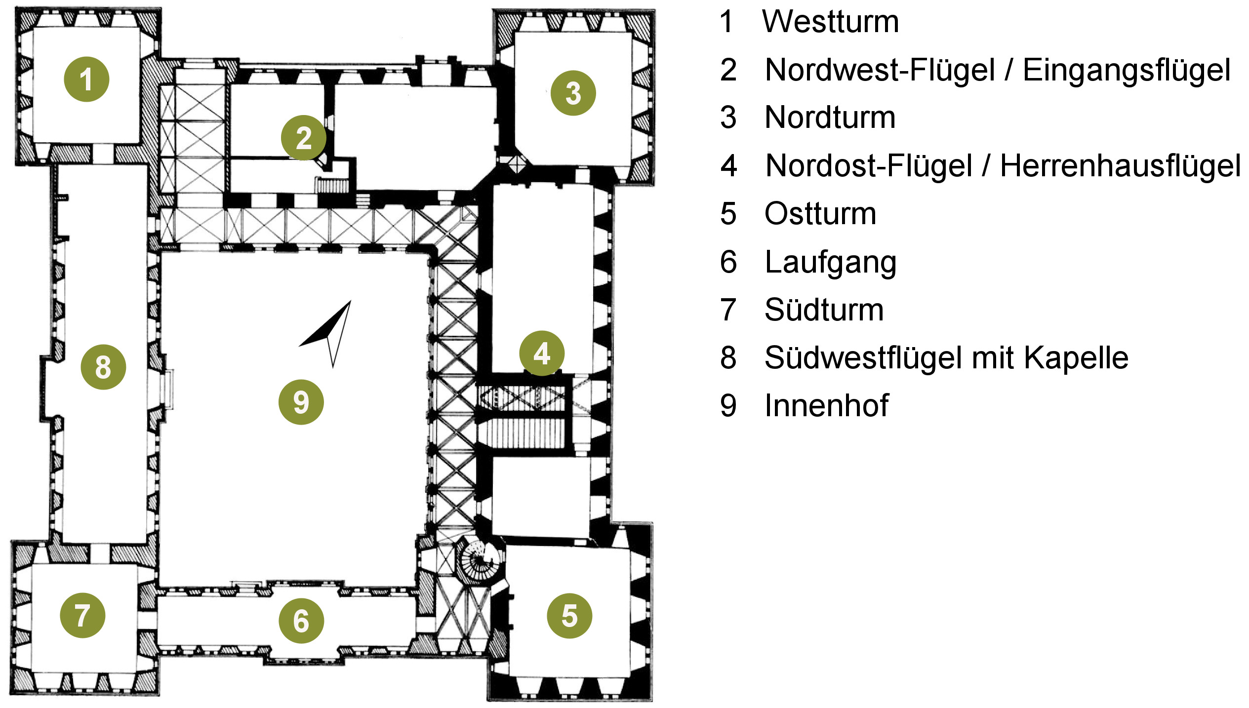 Grundriss von Schloss Horst in Gelsenkirchen um 1850